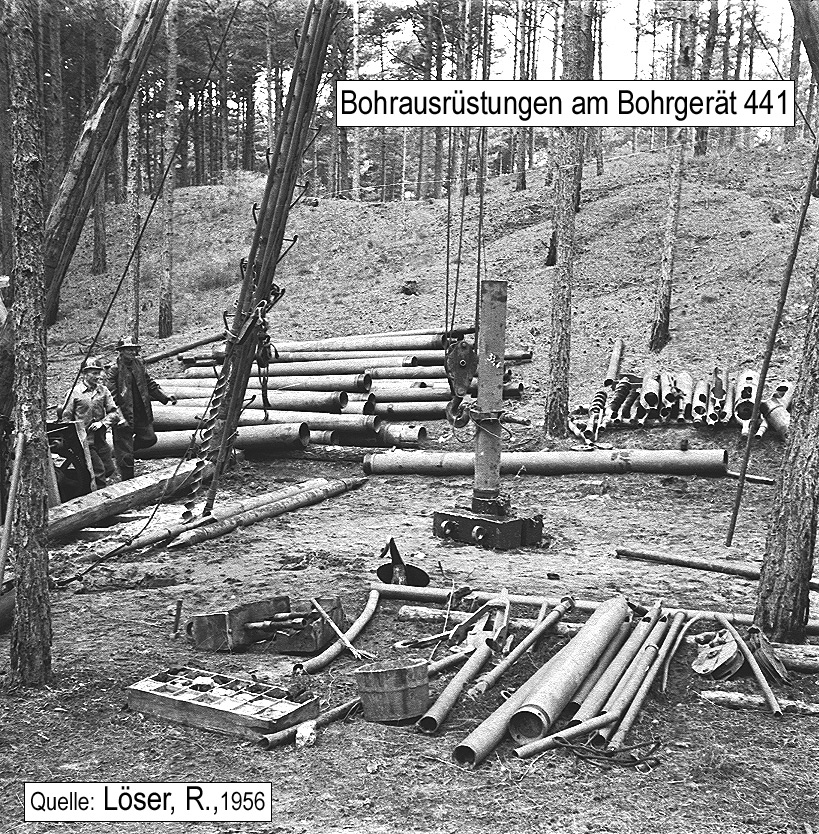 Bohrausrüstungen am Bohrgerät 441